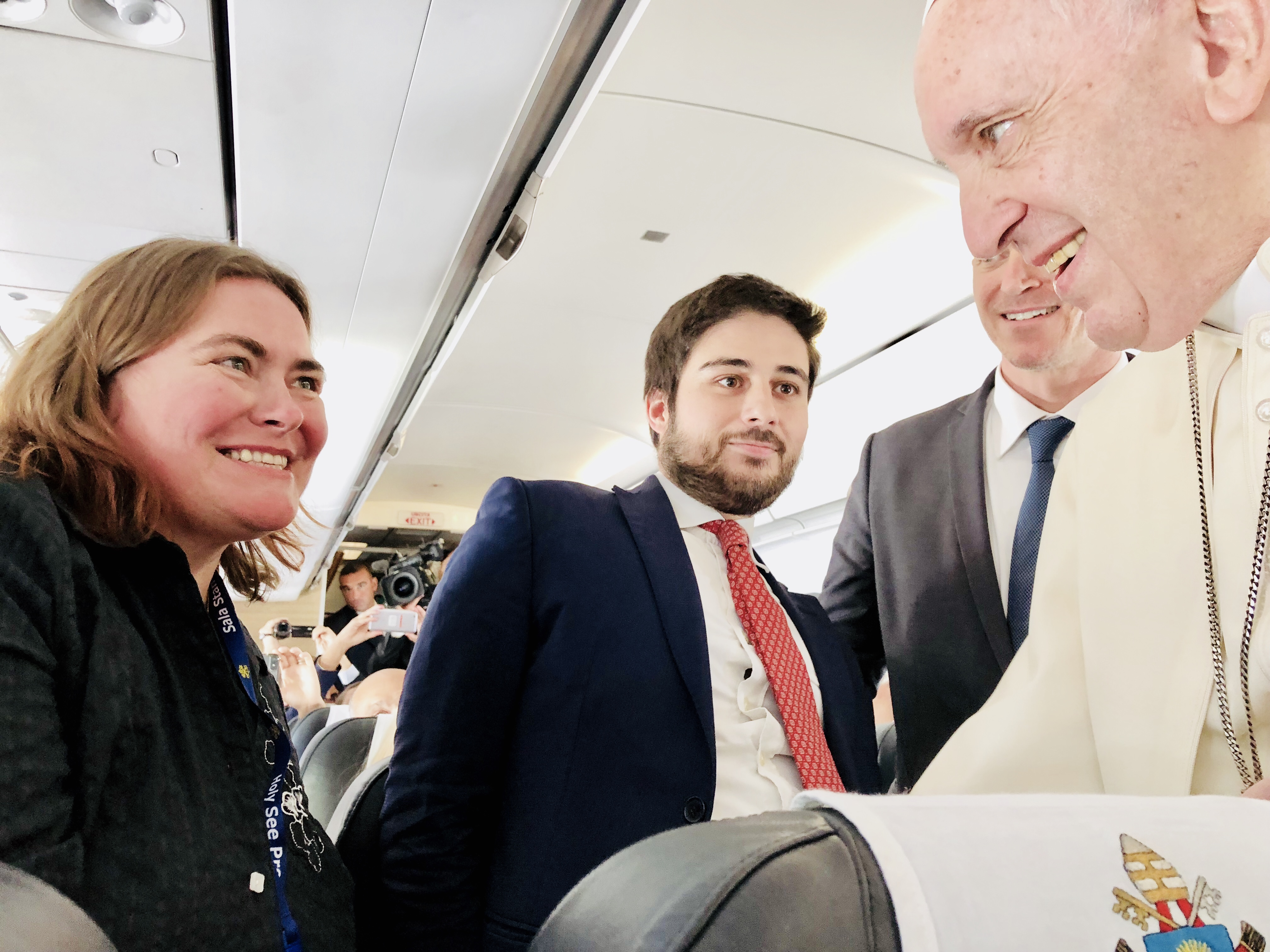 Paavst Franciscus kätles lennul Roomast Vilniusse kõiki reisi kajastavaid ajakirjanikke. Fotol saab paavsti tervituse osaliseks Bianca Mikovitš.